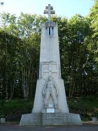 Monument en hommage aux libérateurs 39-45 à Lomont, sculpture en pierre par Enrico Campagnola.